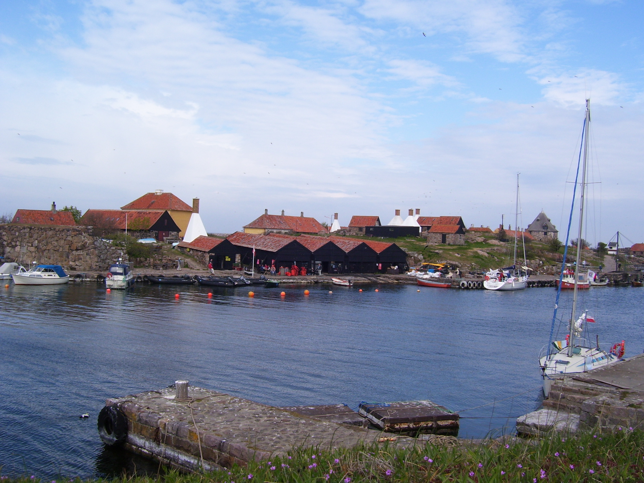 Fredriksø. Widok z Christiansø na Ertholmene